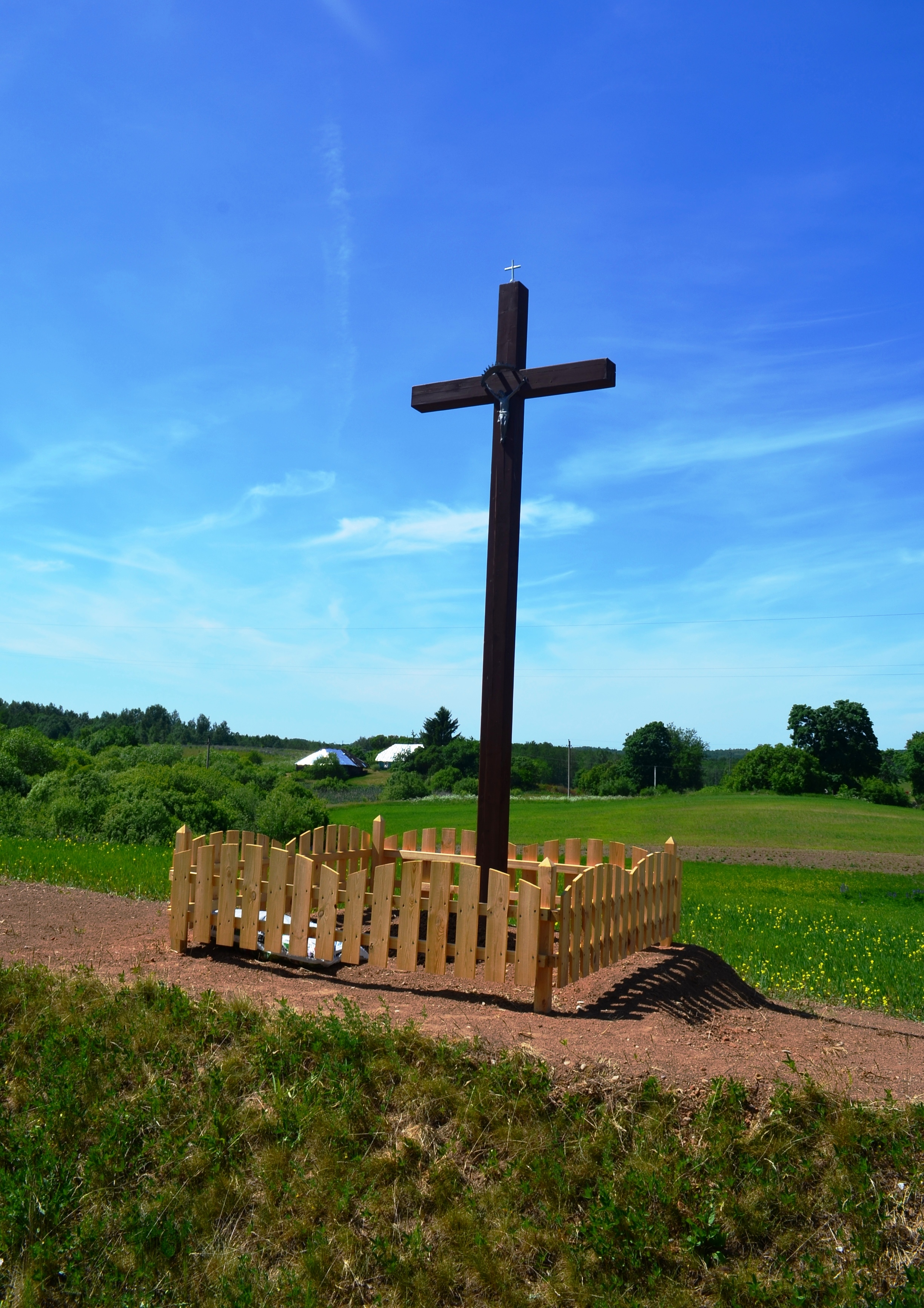 Kaimo kryžius, Sidabriai, Vilniaus r.